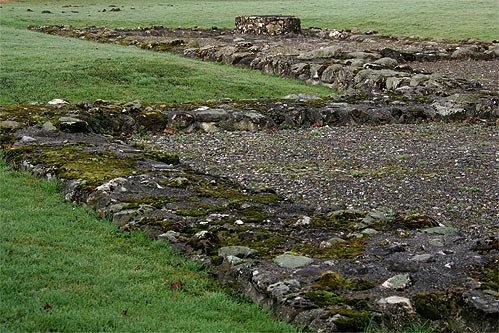 Sursee: Ruine einer frühmittelalterlichen Kirche